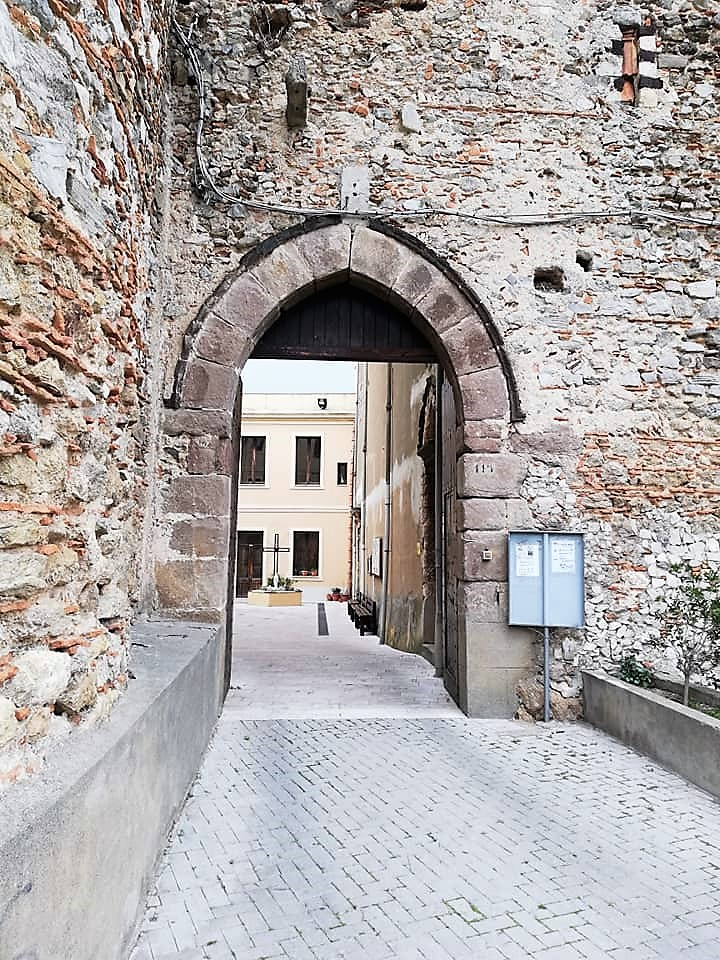 Porta di accesso al seminario e santuario. Dall'esterno.